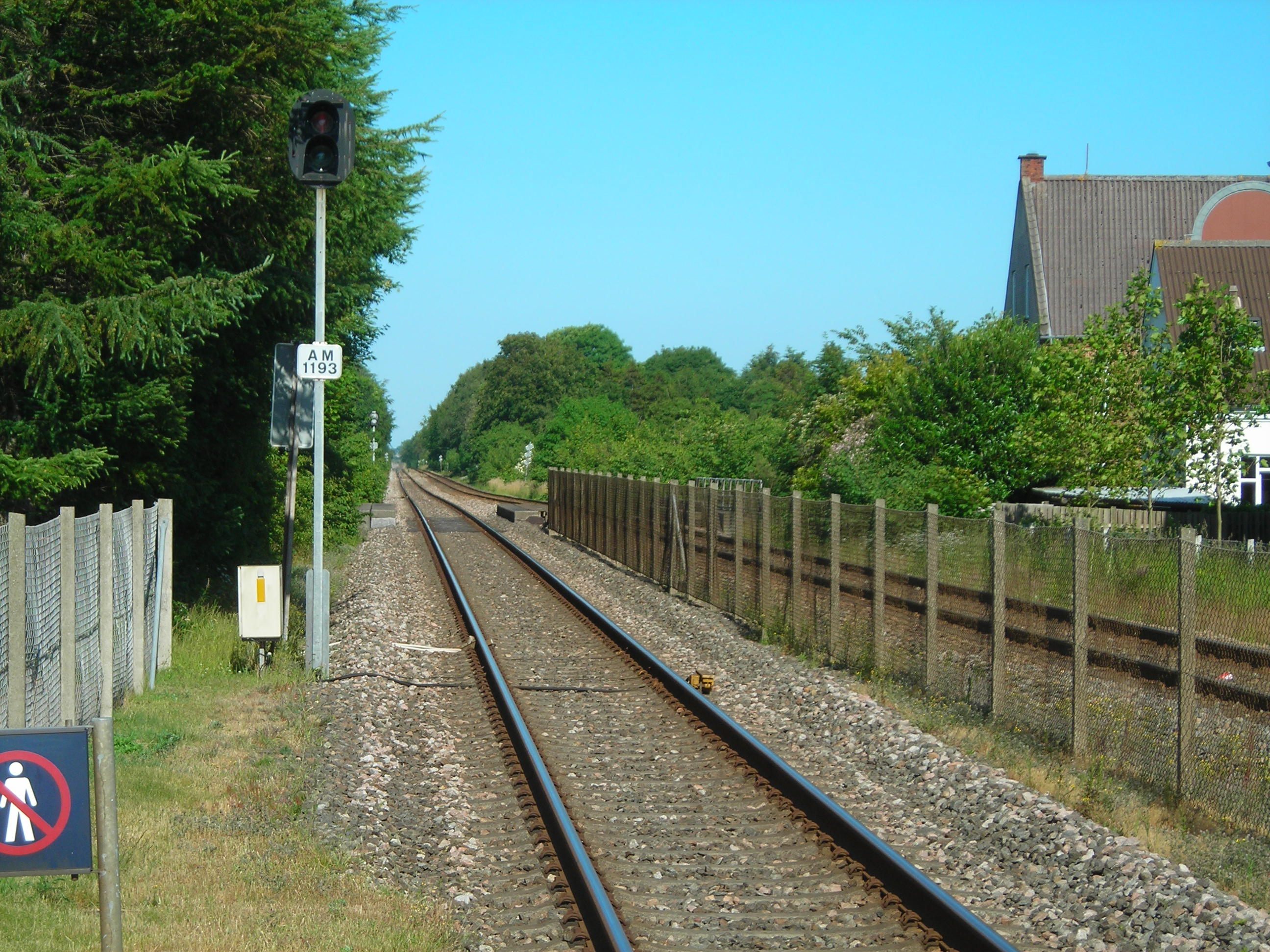 The railway Kolding-Esbjerg at Brørup in Denmark